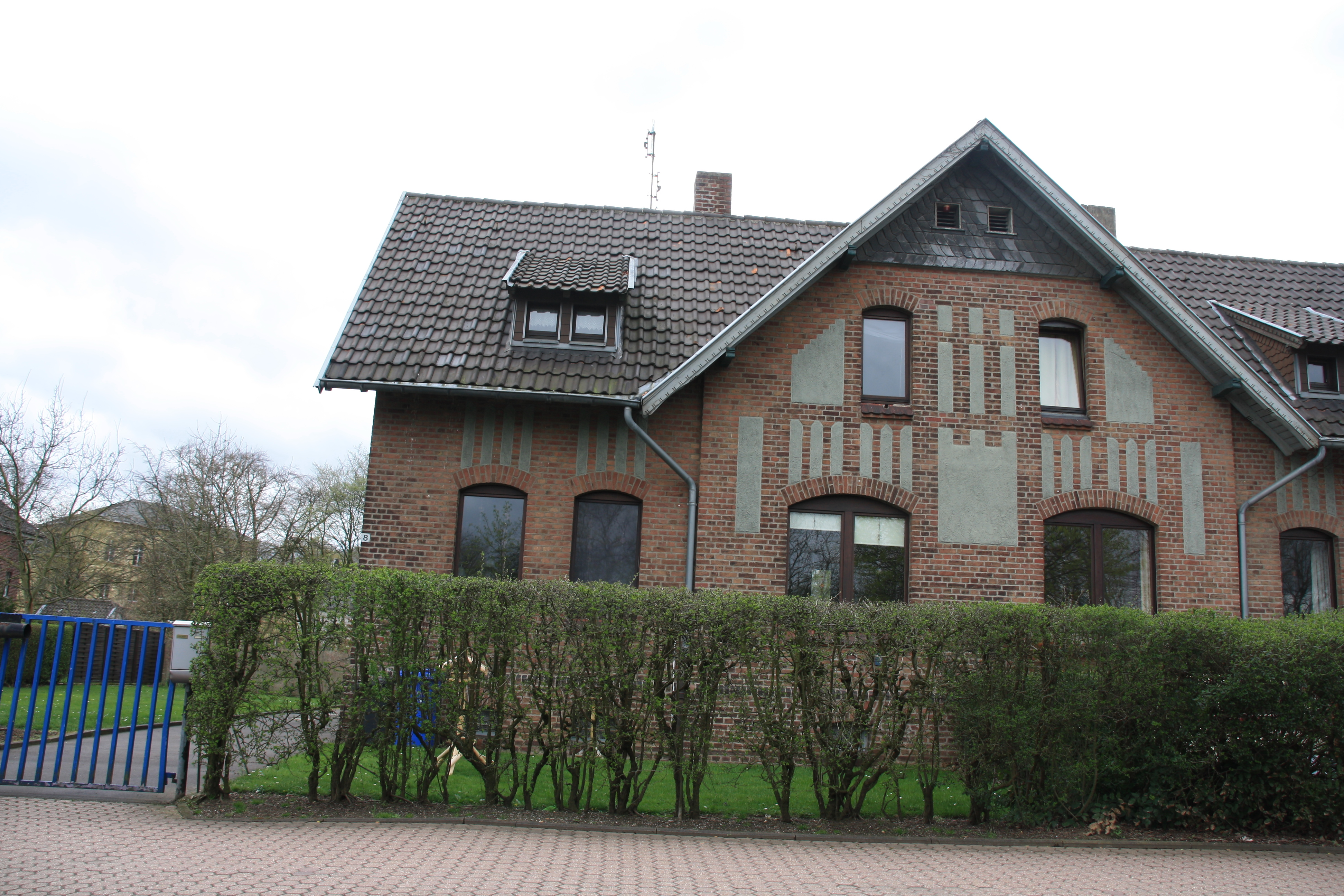 Das Doppelhaus Heerweg 6-8 in Düren